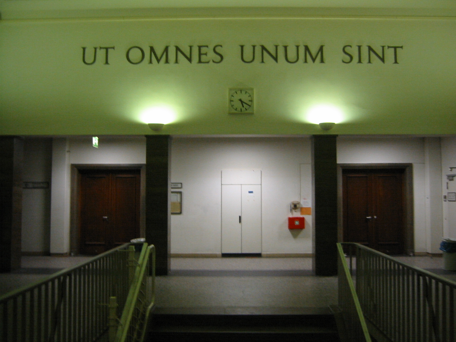 Das Inter 1 in Mainz